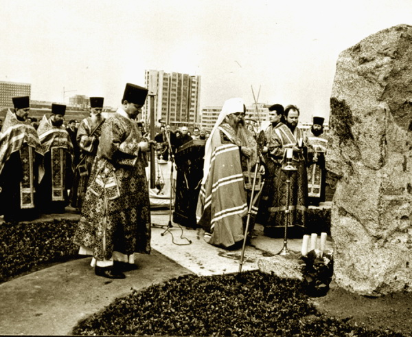 Митрополит Филарет совершает закладку памятного камня на месте будущего строительства. 26 апреля 1991 года.